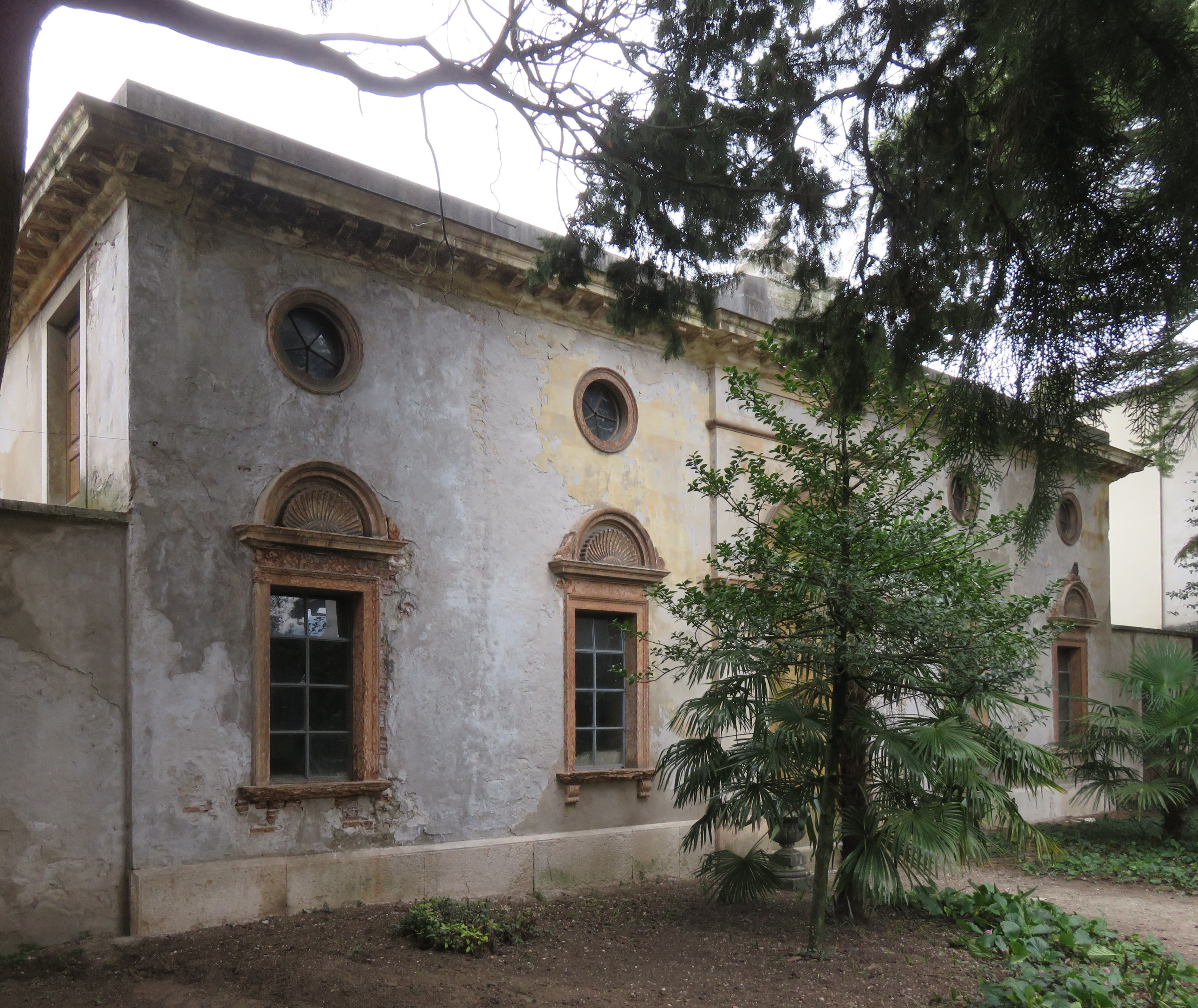 Palazzo Betta Grillo - giardino con scuderia